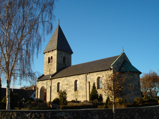 Skørring Kirke, fotograferet af undertegnede. Sommer 14. nov 2007, 21:48 (CET)